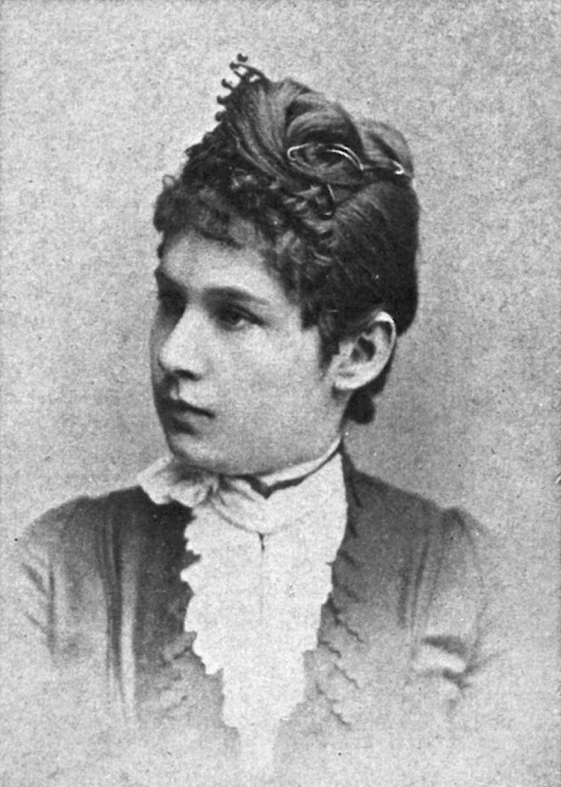 Anežka Schulzová - česká překladatelka a libretistka